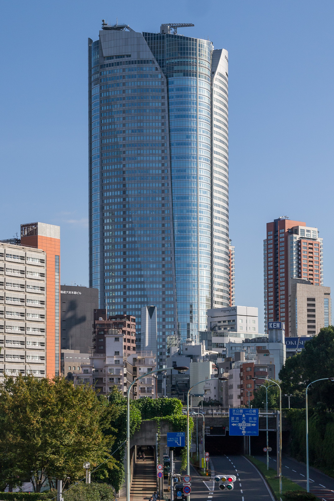 六本木ヒルズ森タワー、東京都港区六本木。